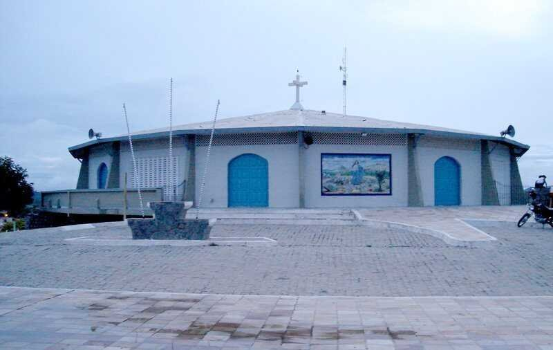 Fotografia que retrata a Matriz da Imaculada Conceição, localizada em Currais Novos-RN-Brasil